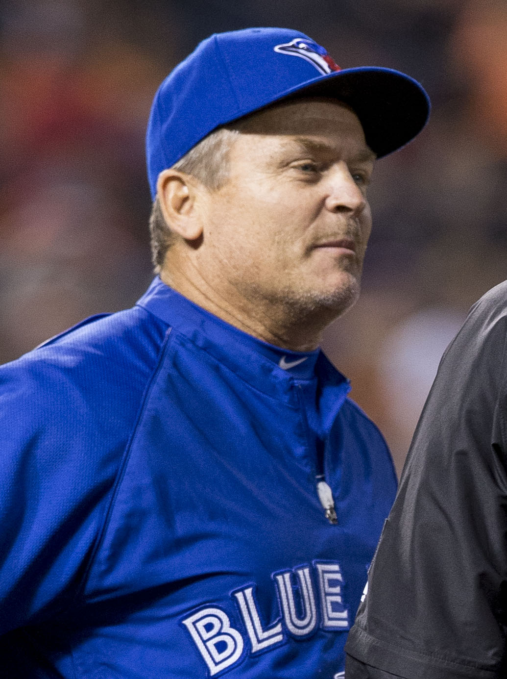 Blue Jays at Orioles 4/12/14